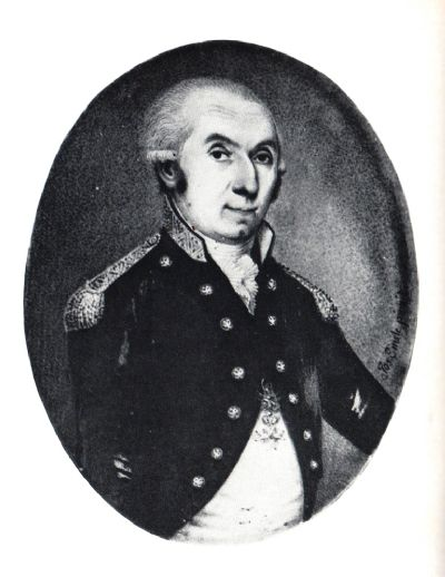 Portrait des Joseph Paul Edler von Cobres (1737/1749 - 1823) in der Uniform eines Ritters des Malteserordens. Das Originalbildnis wurde durch Kriegseinwirkung im Februar 1944 zerstört.